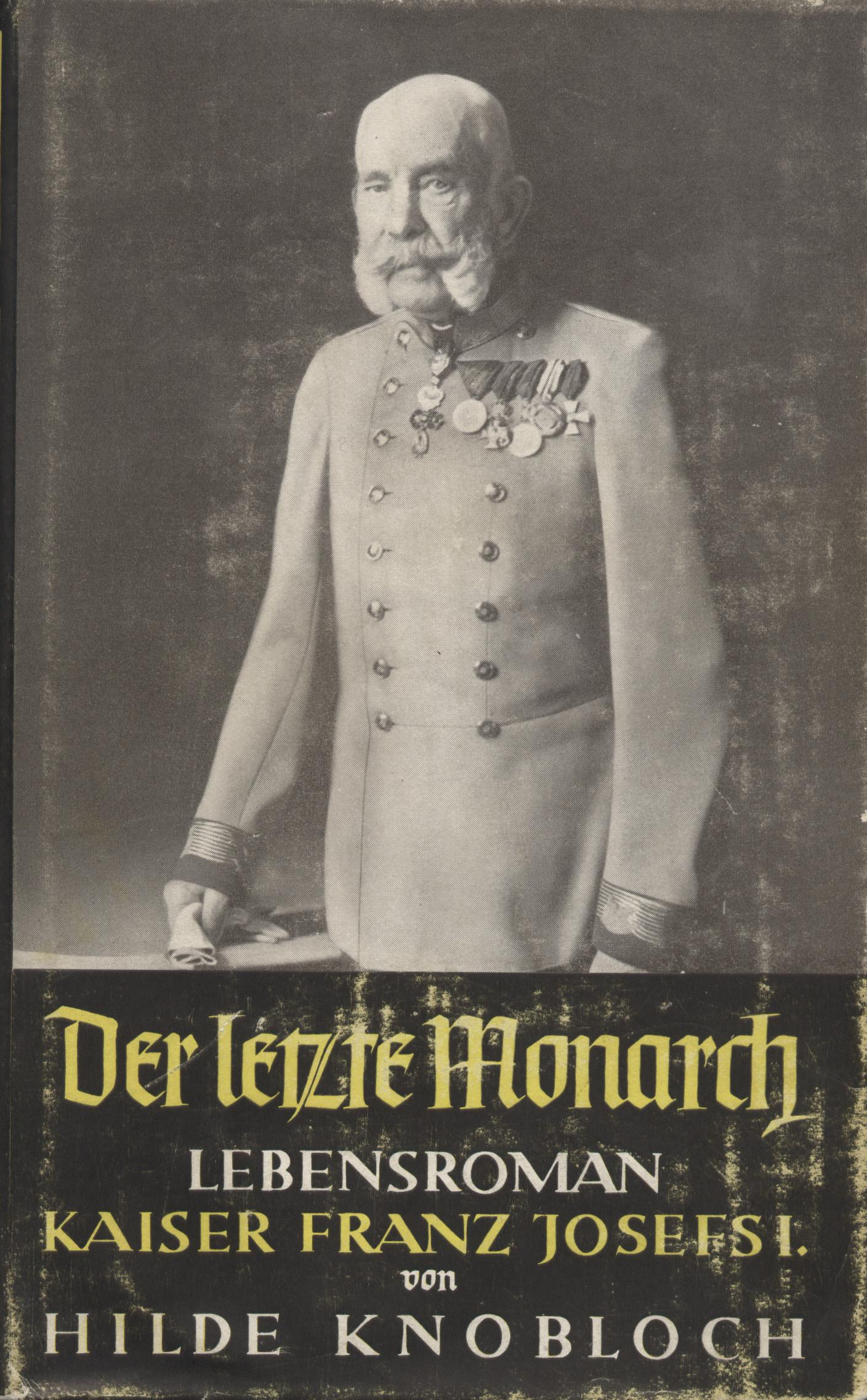 Hilde Kobloch, Buchcover